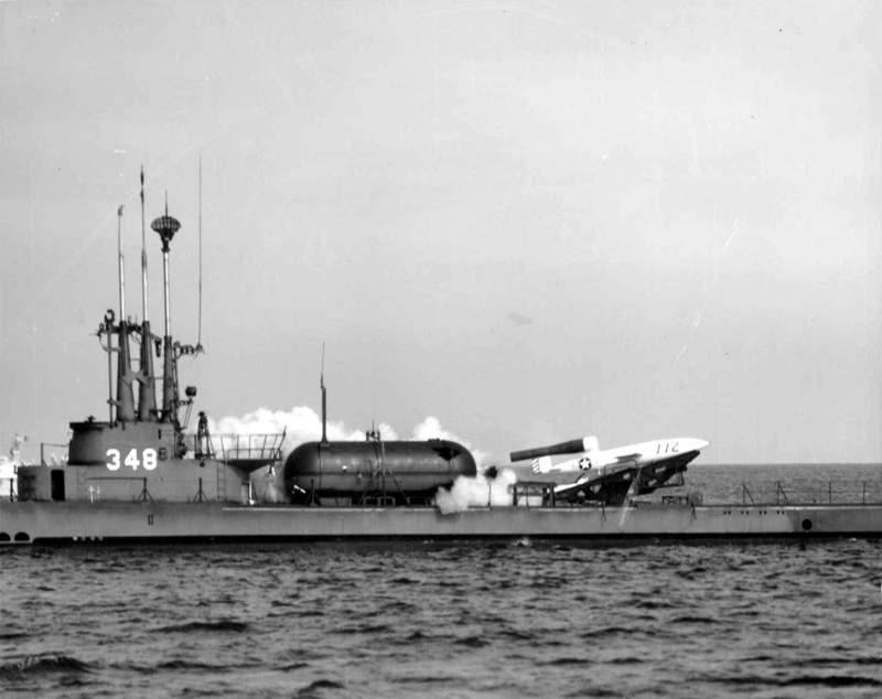 USS Cusk (SS 348) feuert einen V-1 Nachfolger-Marschflugkörper LTV-N-2 "Loon" ab